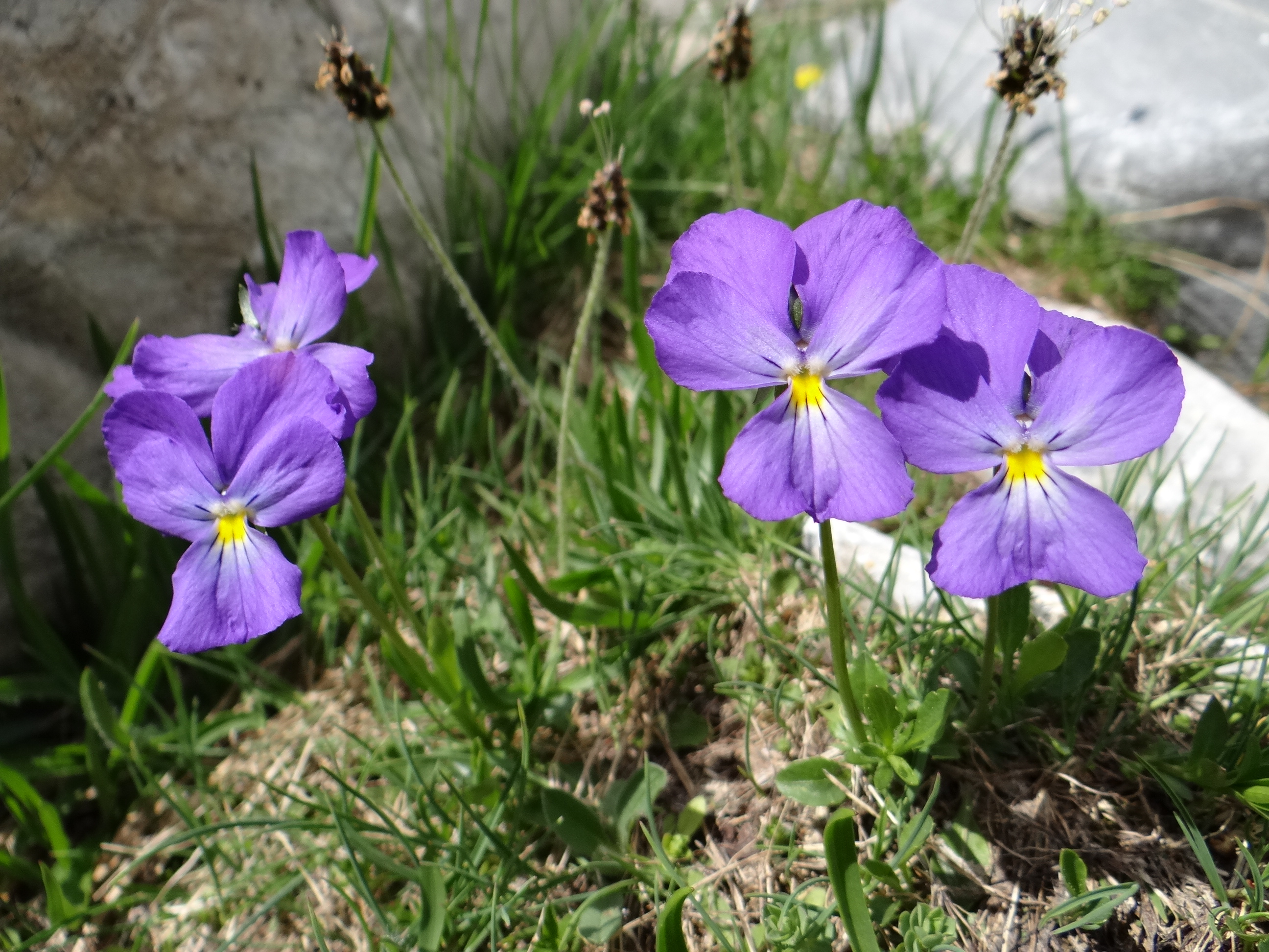 Pensées éperonnées en Vanoise, Parc national de la Vanoise